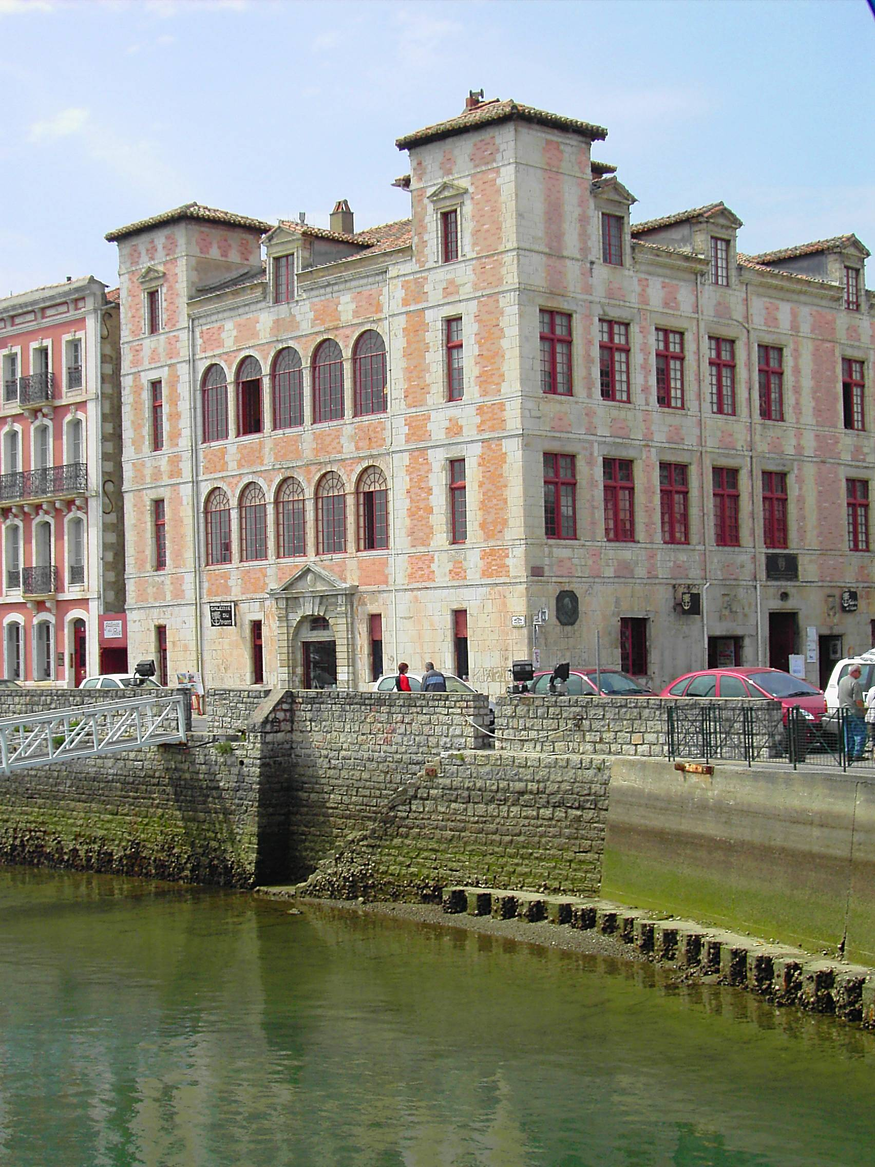 La Maison de l'Infante à St Jean de Luz le 05/04/06 par Harrieta171